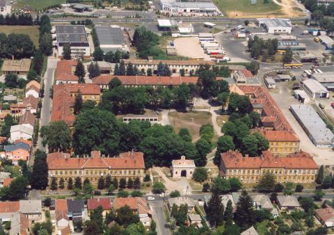 Die ehemalige Erzherzog Joseph Kaserne in der Dózsa György Strasse, Nagykanizsa, Ungarn